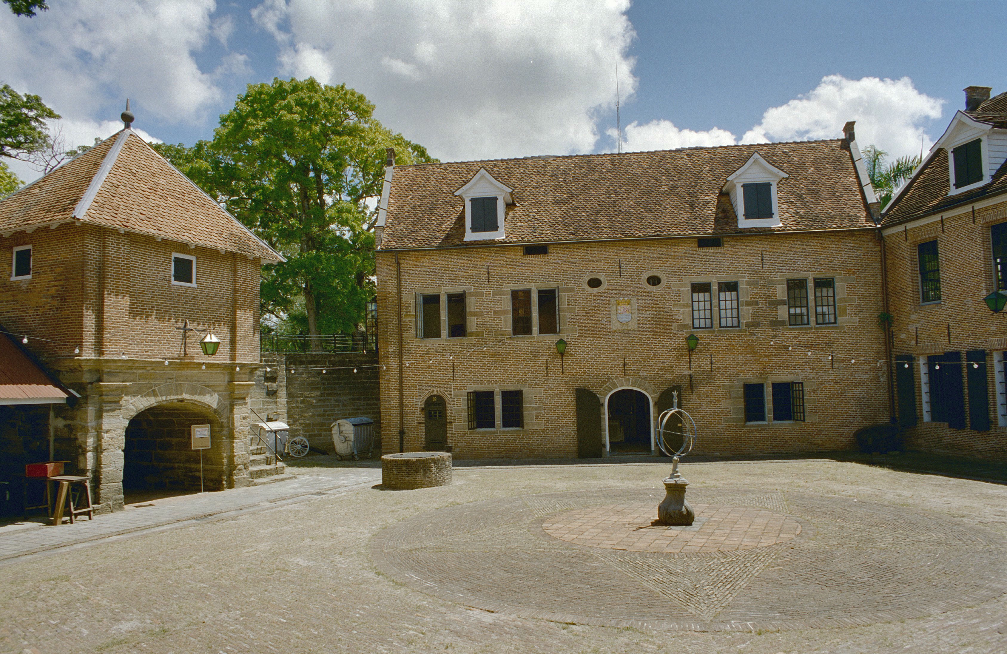 Fort Zeelandia: Overzicht binnenplaats met voorgevel gebouw 3 en poortgebouw (opmerking: Suriname Reis Loek Tangel)